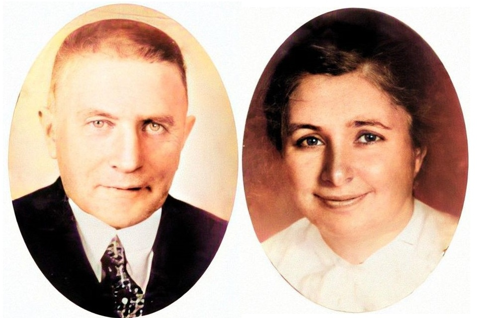 Erich und Elisabeth Wolf, Eigentümer der Villa Wolf, aufgenommen auf einer Informationssäule im Waszkiewicz-Park